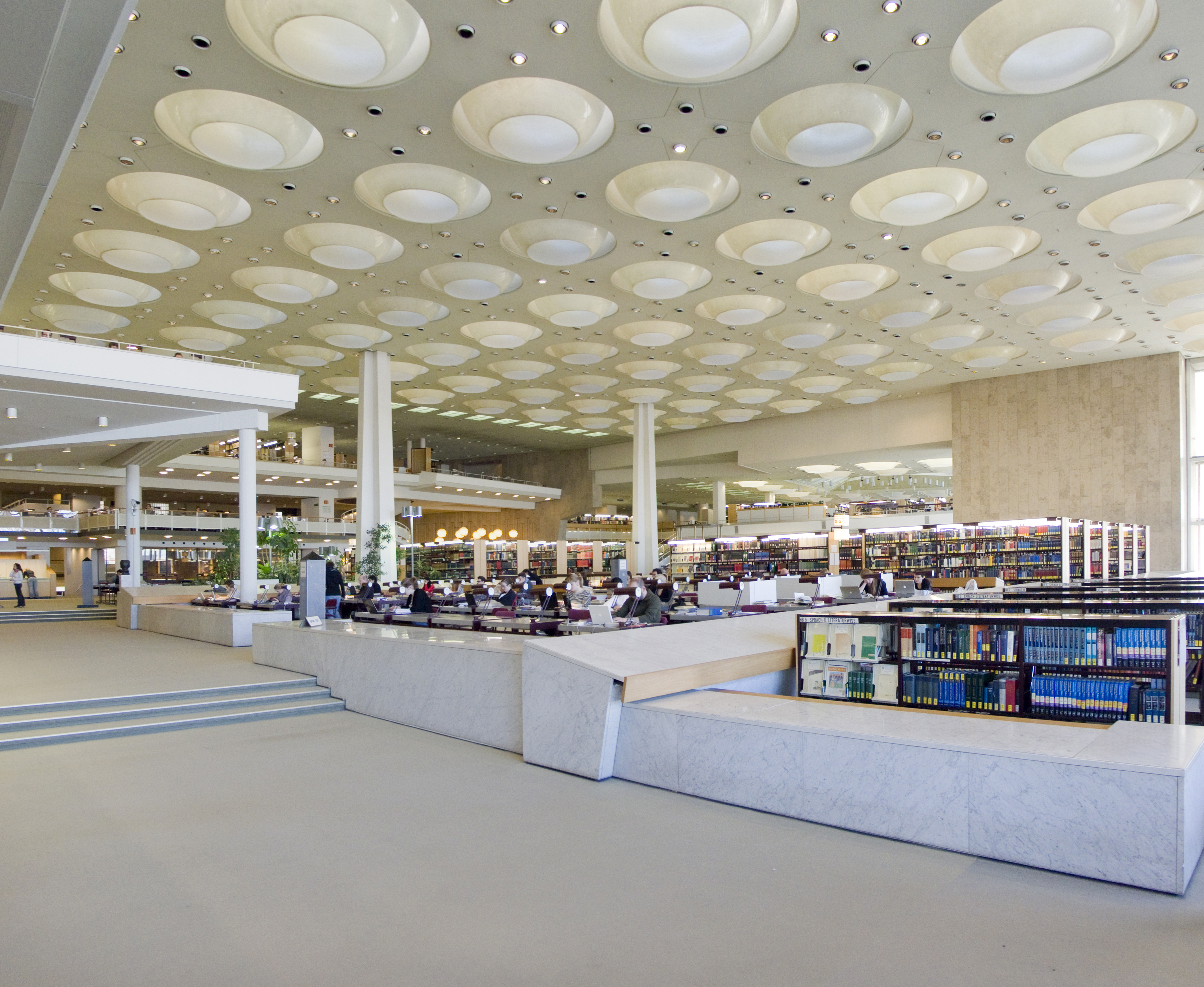 Staatsbibliothek Berlin, Haus Potsdamer Straße, Lesesaal, Hans Scharoun, Edgar Wisniewski, Berlin-Tiergarten, Aufnahme März 2011